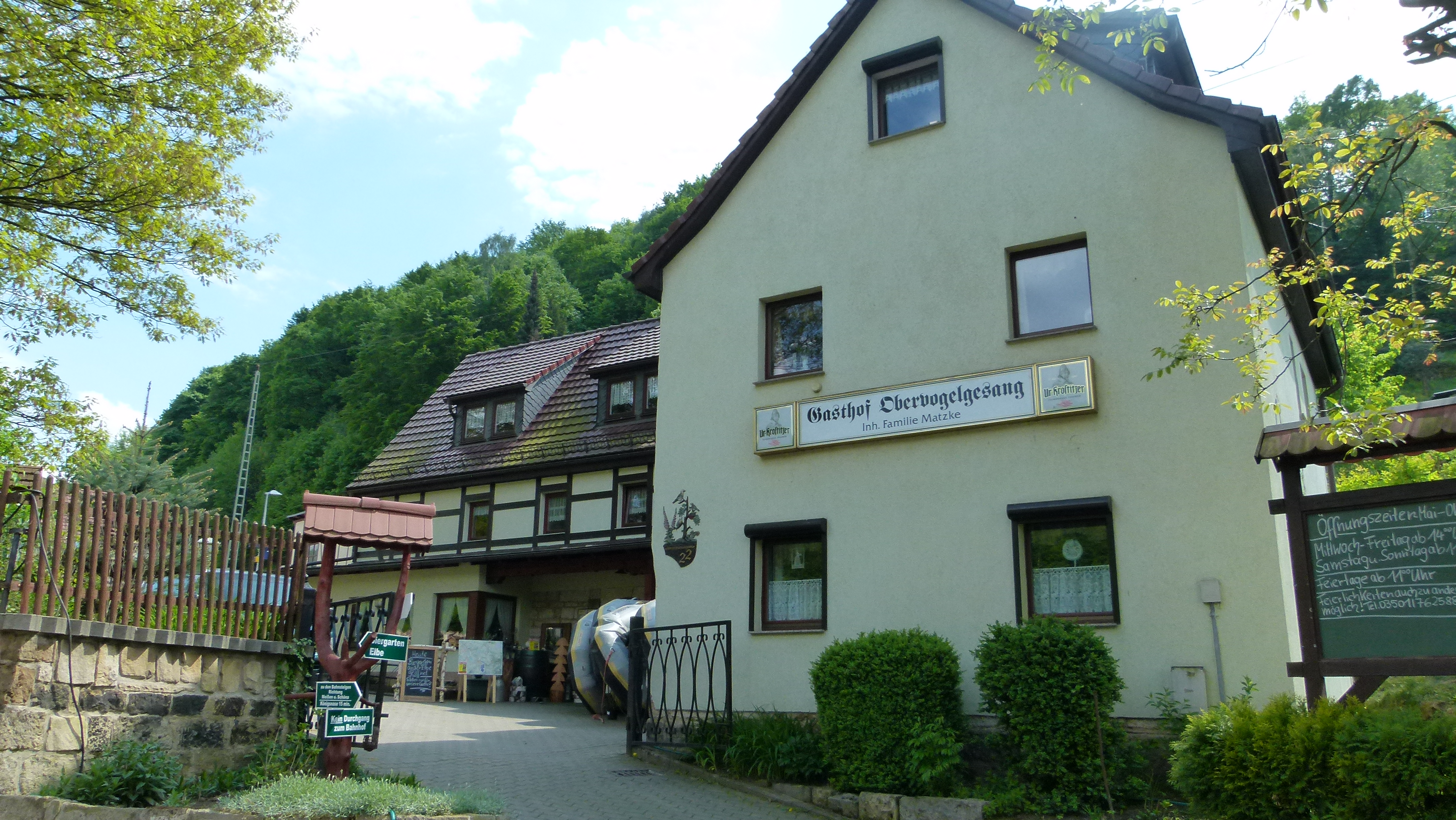 Denkmalgeschützter Gasthof, Obervogelsang 22, Pirna, Sachsen